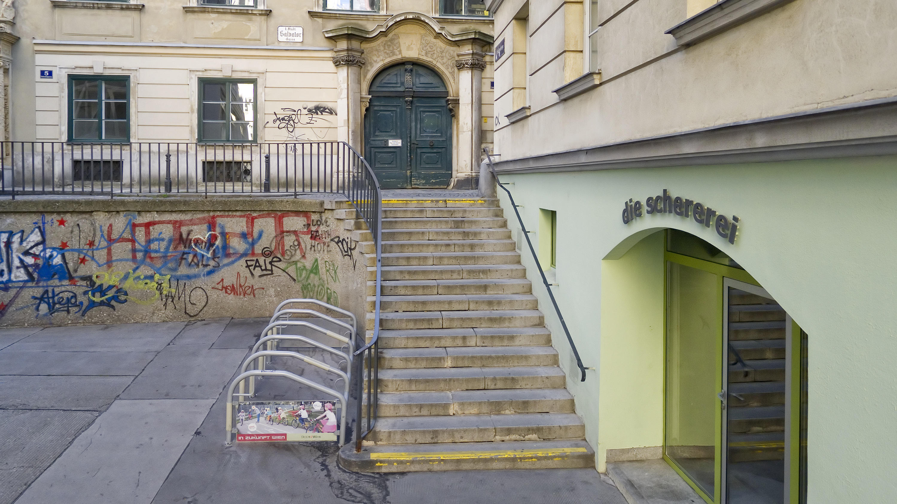 Fischerstiege in Wien 1 bei Nr. 2 Richtung Süden